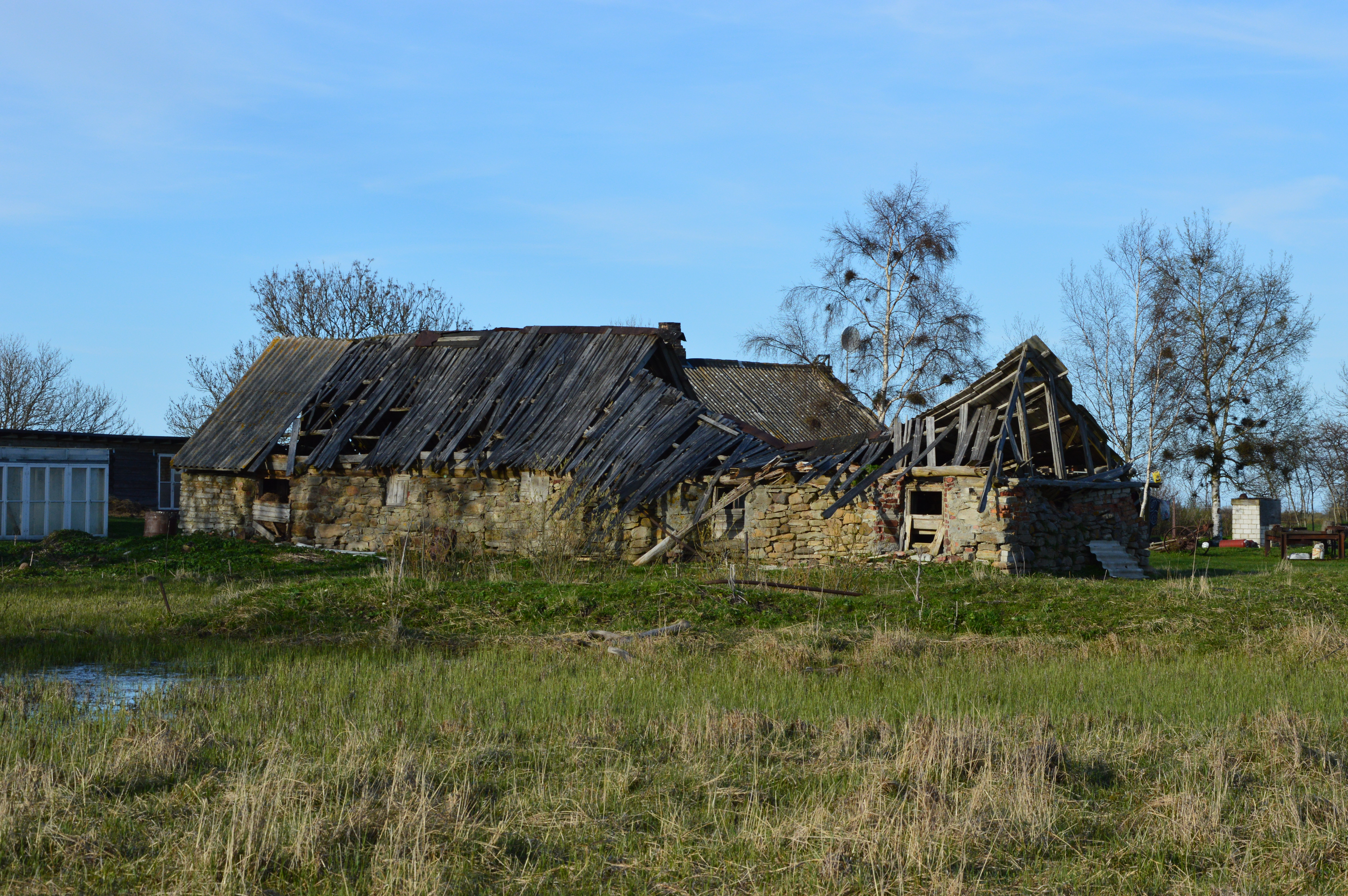 Erkase talu laut, Bien, Osmussaar.